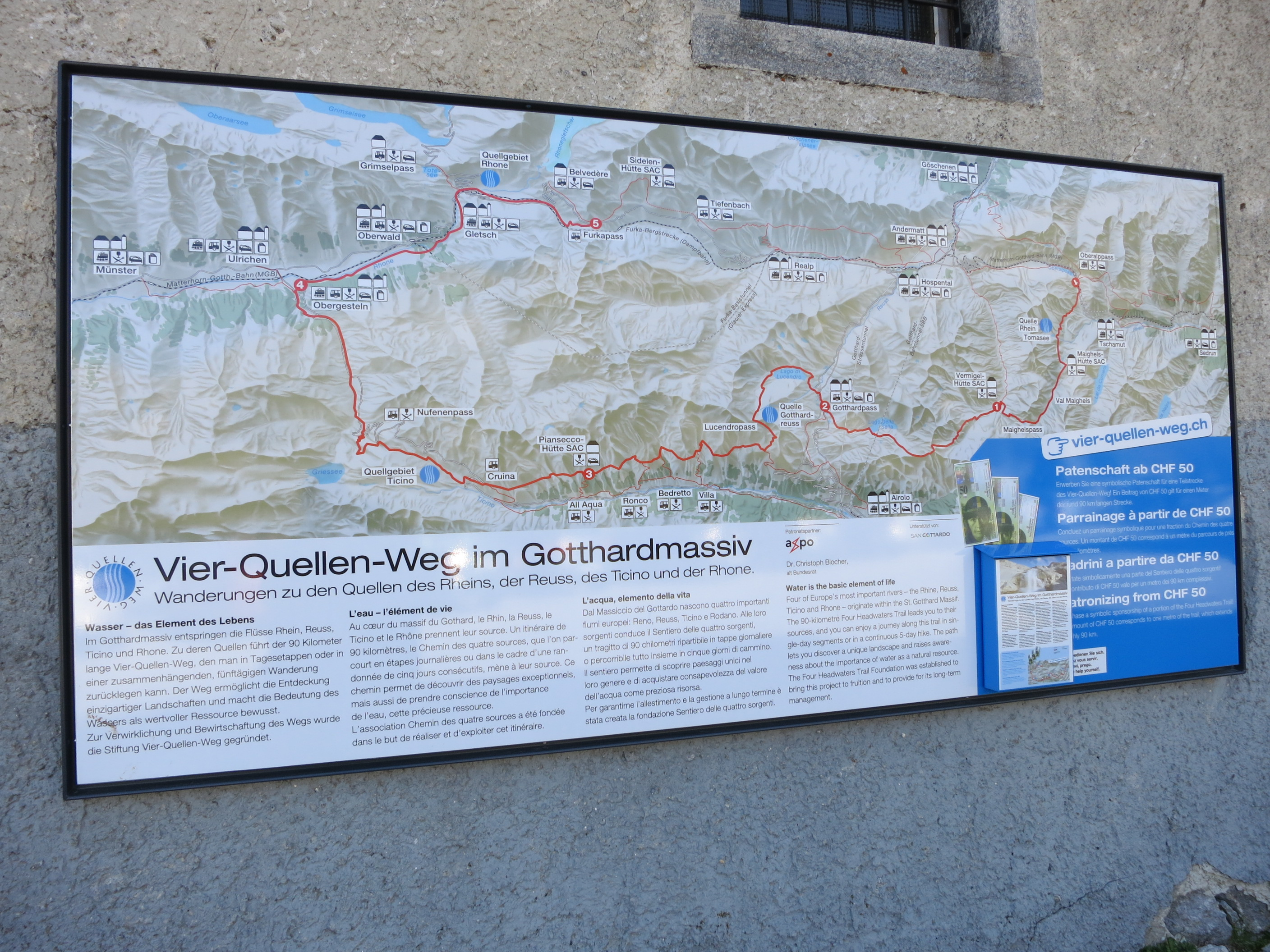 Vierquellenweg, Gotthard Hospiz, Schweiz